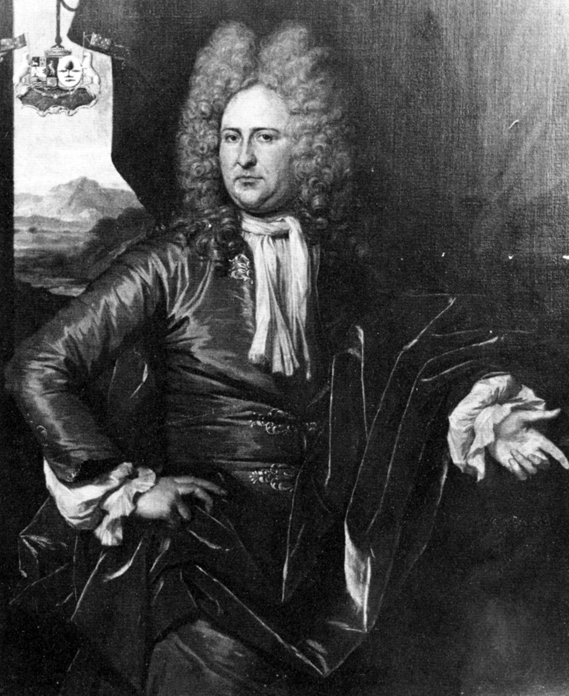 Appolonius Lampsins (1674-1728).